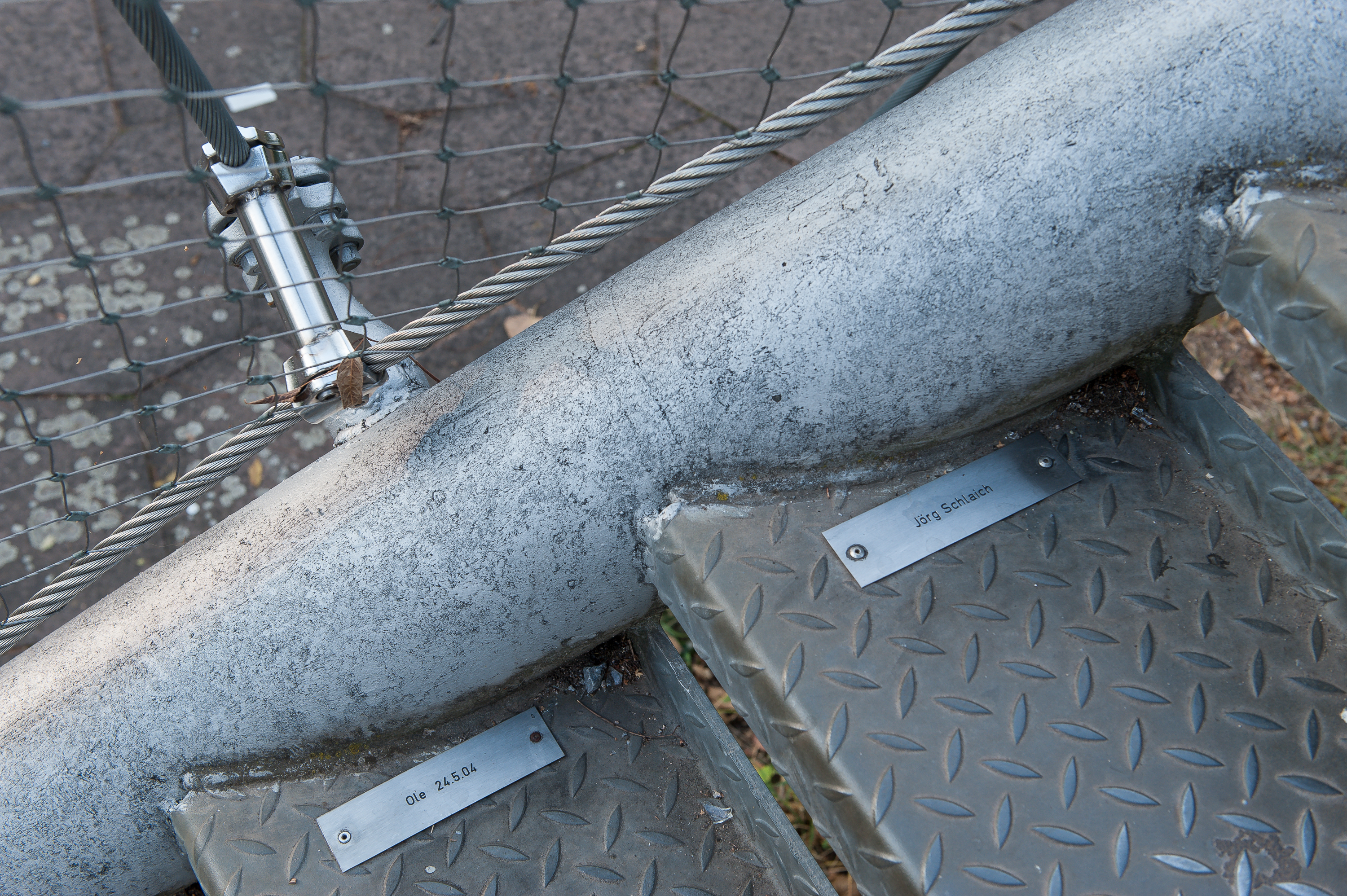 Killesbergturm, Stuttgart. Treppenstufen mit Stifterplaketten